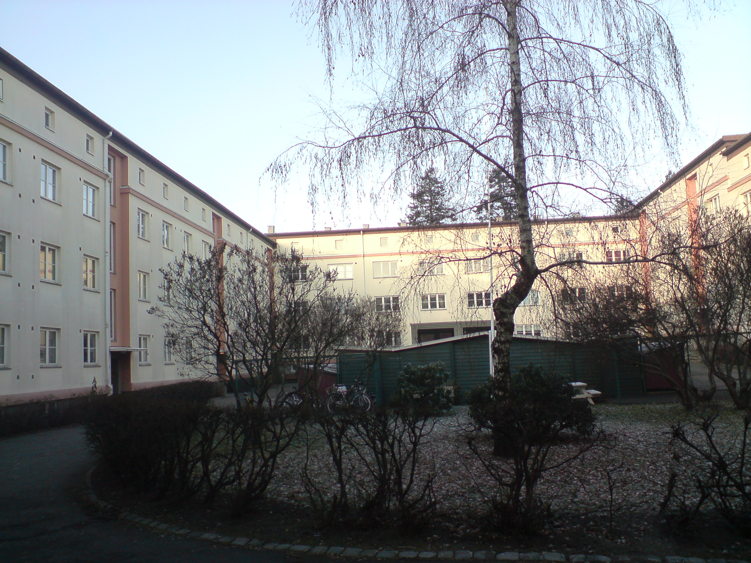 Etterstadsletta 4